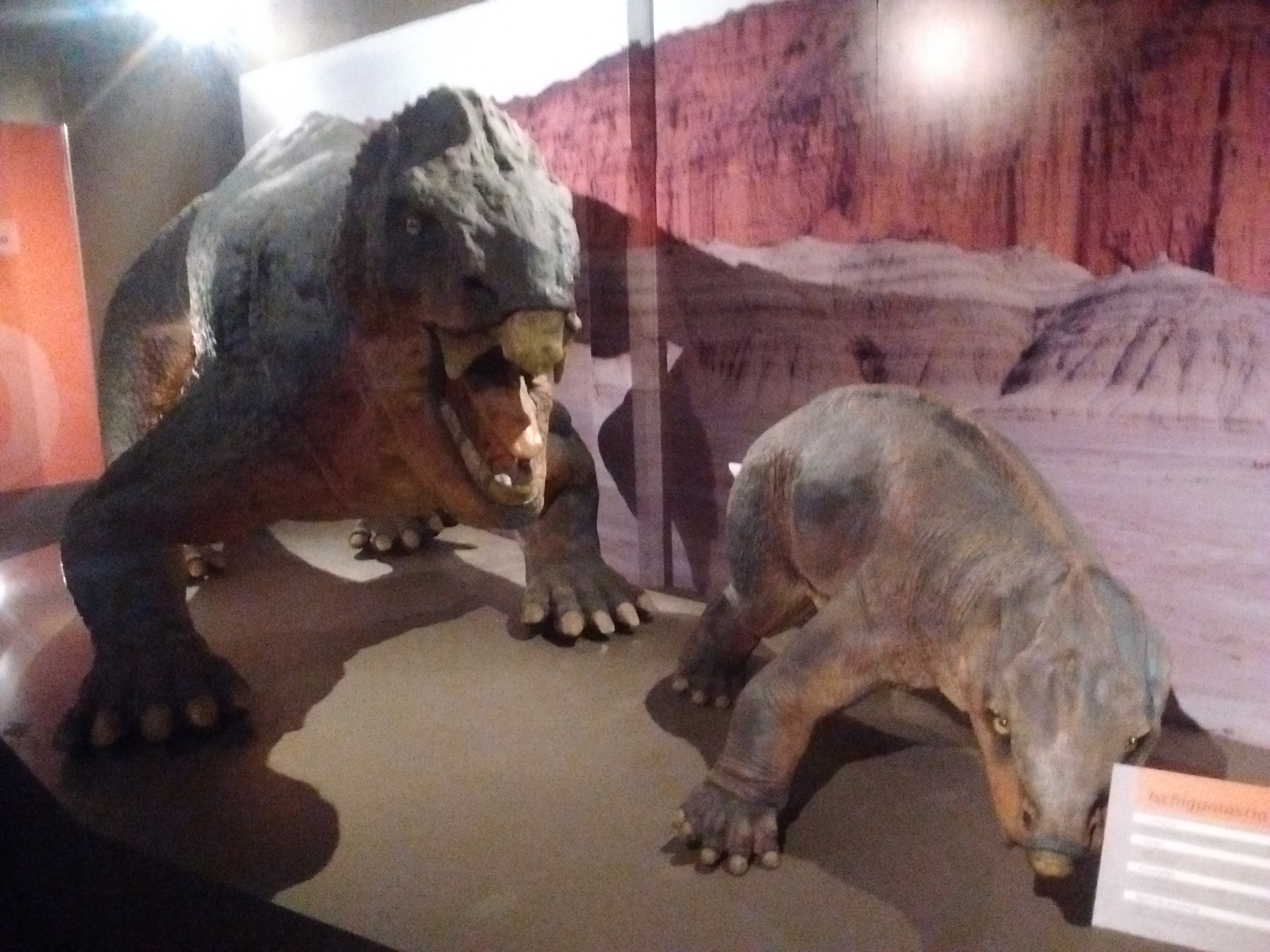 Recreación paleoartística de la locomoción del ISCHIGUALASTIA y su CRÍA.